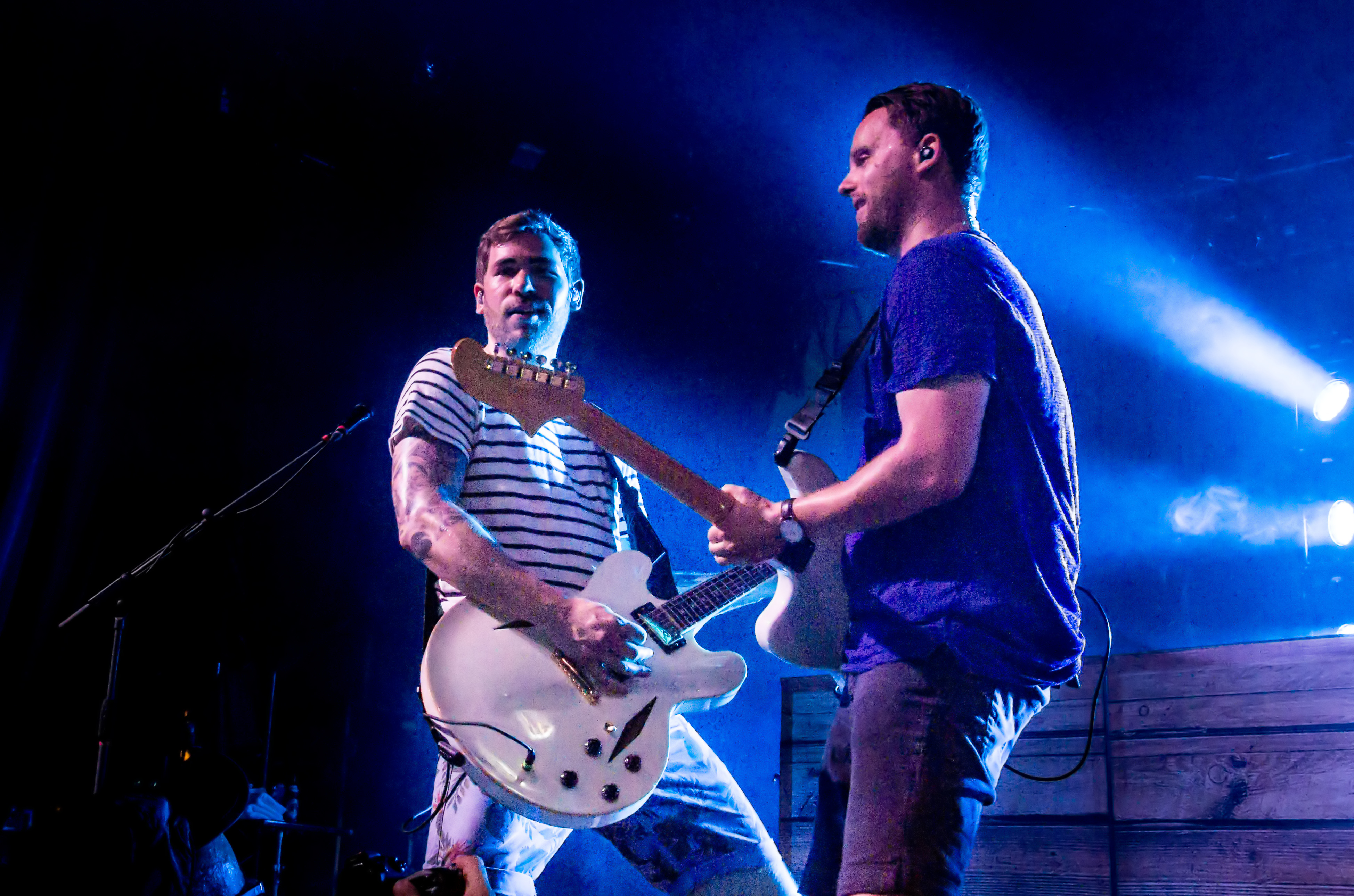 Bilder vom ZMF 2015 Revolverheld im Zirkuszelt